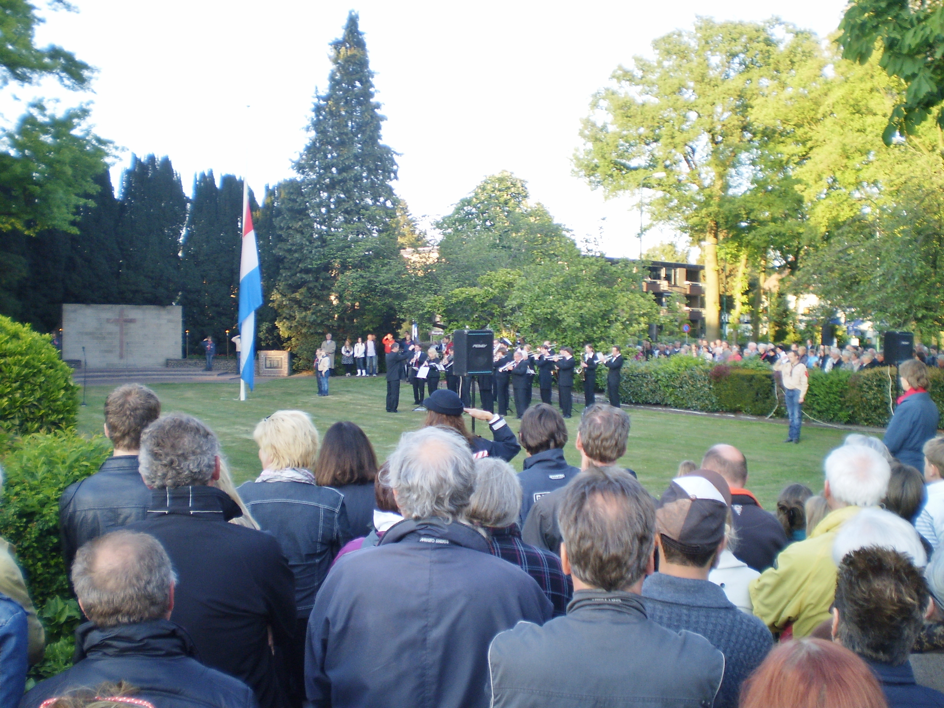 Dodenherdenking, met op de achtergrond het Oorlogsmonument.